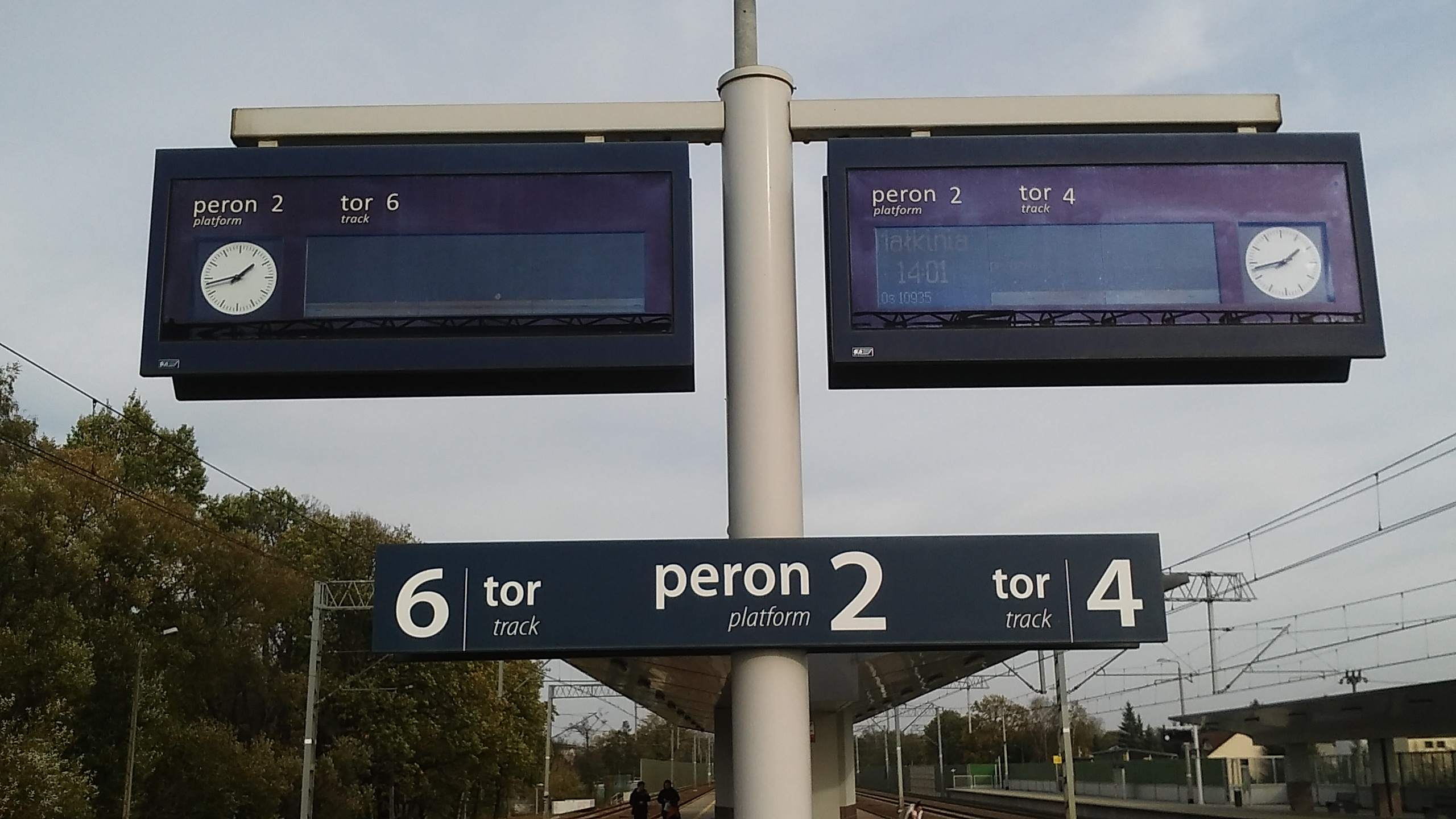 stacja kolejowa Zielonka - elektroniczne tablice informacyjne